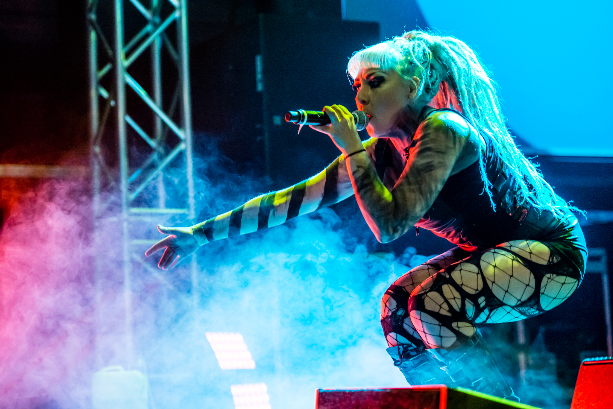 'E-Tropolis 2015; Oberhausen Turbinenhalle': 'Grendel'